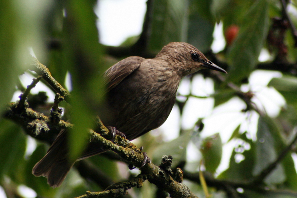 Star Jungvogel, die Farbe des Federkleides ist noch nicht ausgeprägt